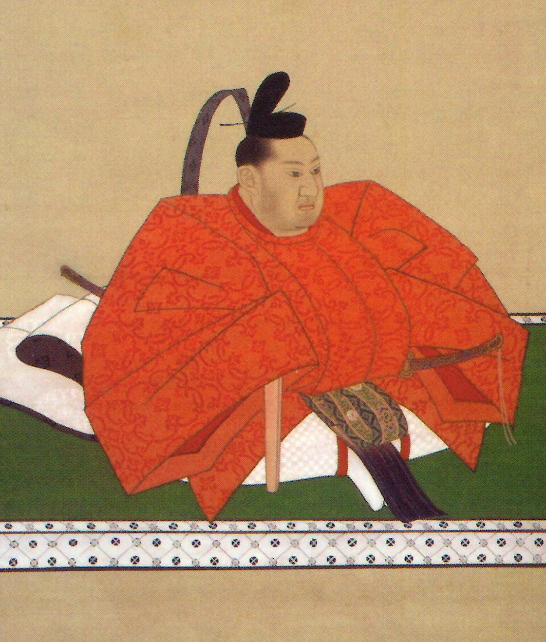 毛利元運の肖像。